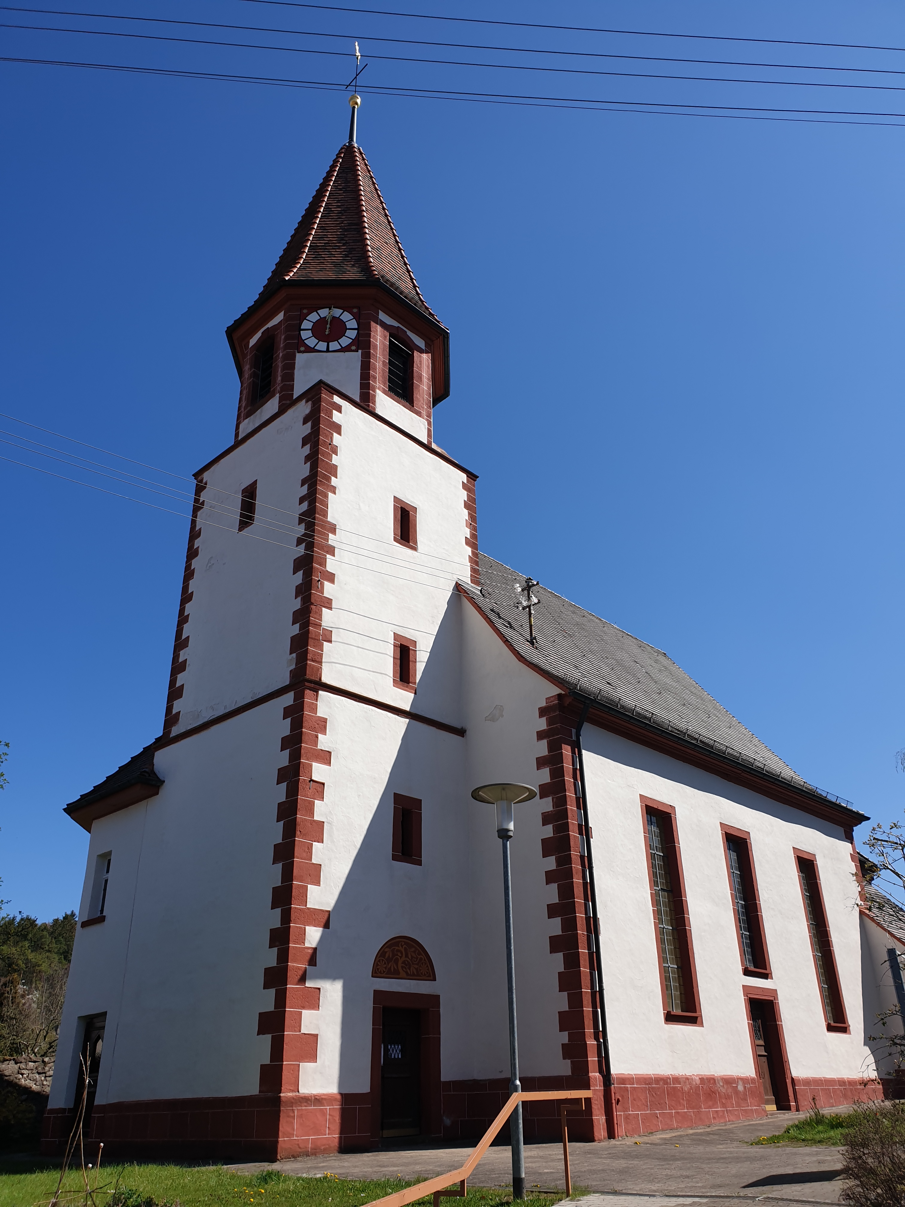 Blick von Südwesten auf die Blumhardtkirche in Möttlingen